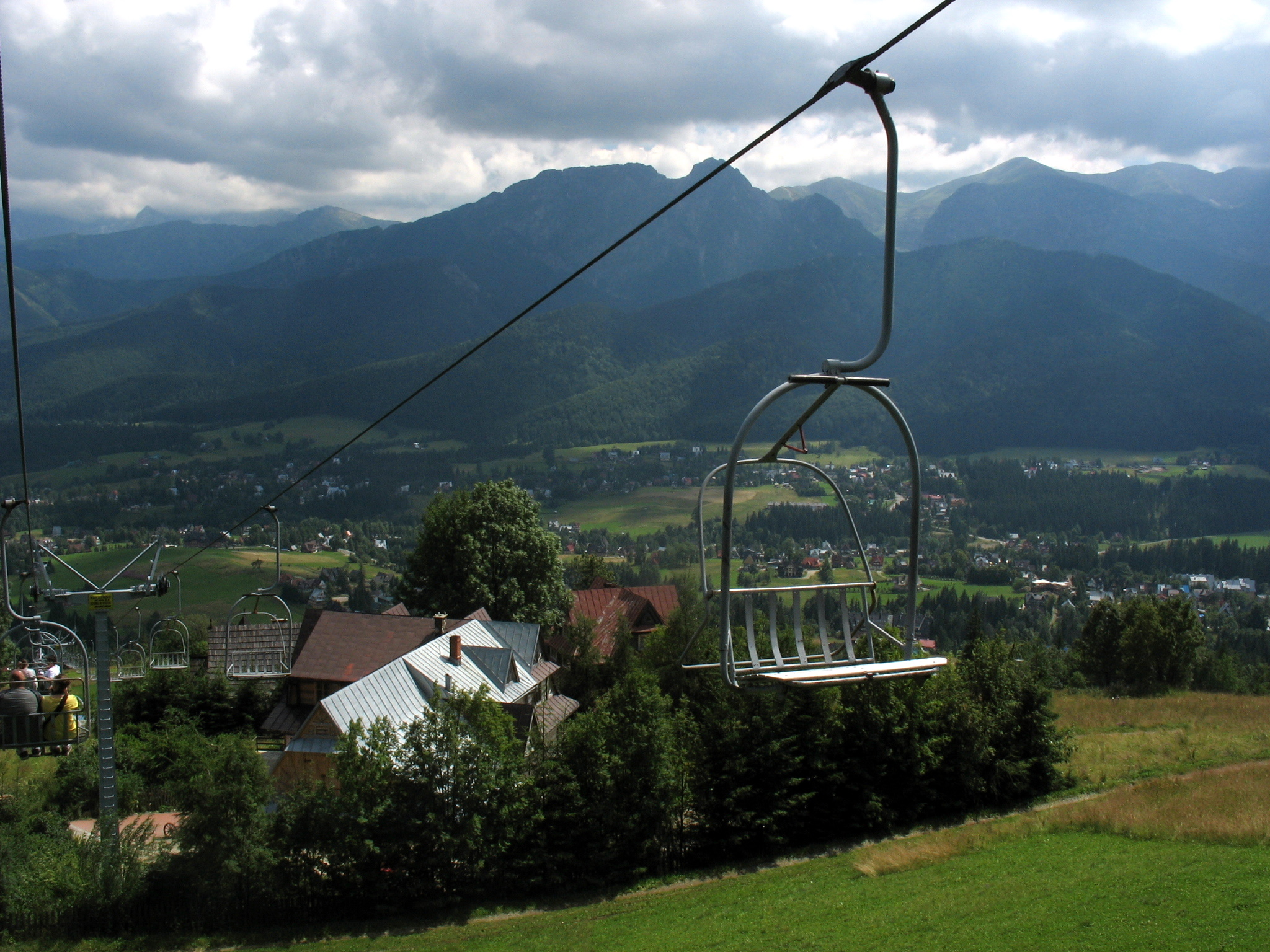 wyciąg krzesełkowy, Zakopane, Butorowy Wierch, Gubałówka, Giewont,Tatry